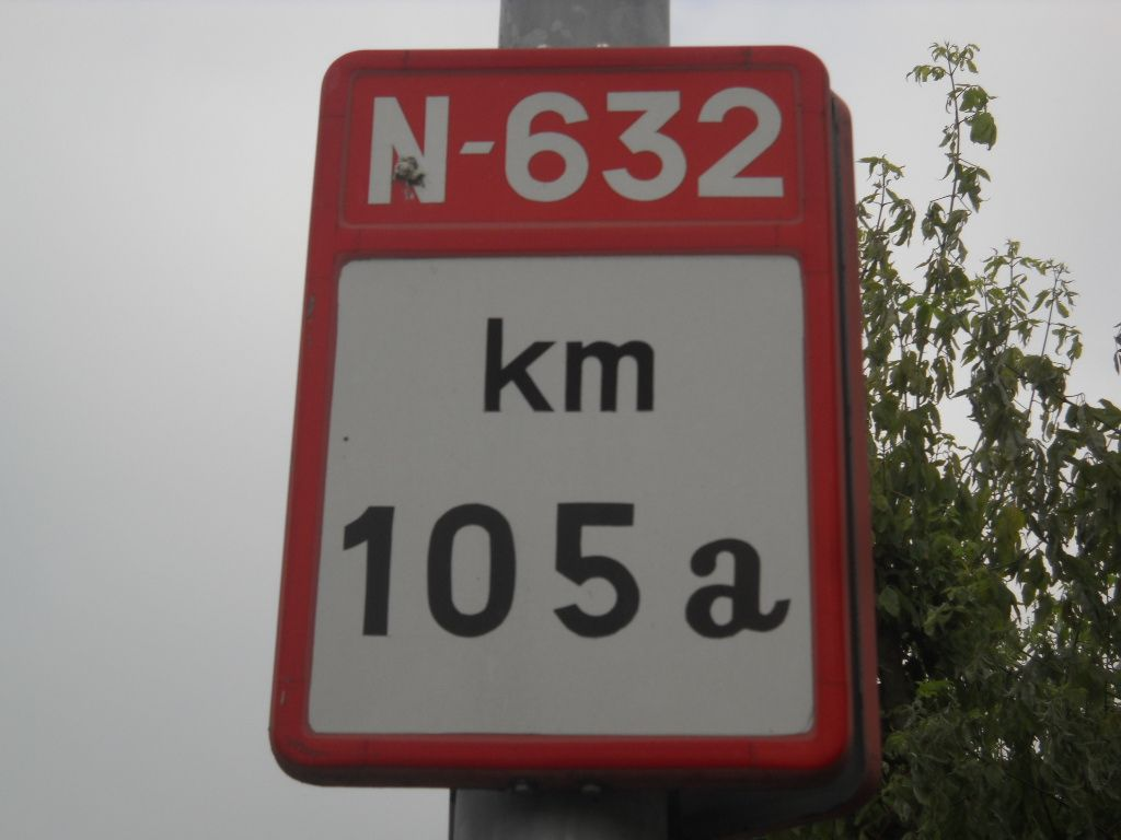 Hito kilométrico de la carretera nacional española N-632a, correspondiente al punto kilométrico 105.